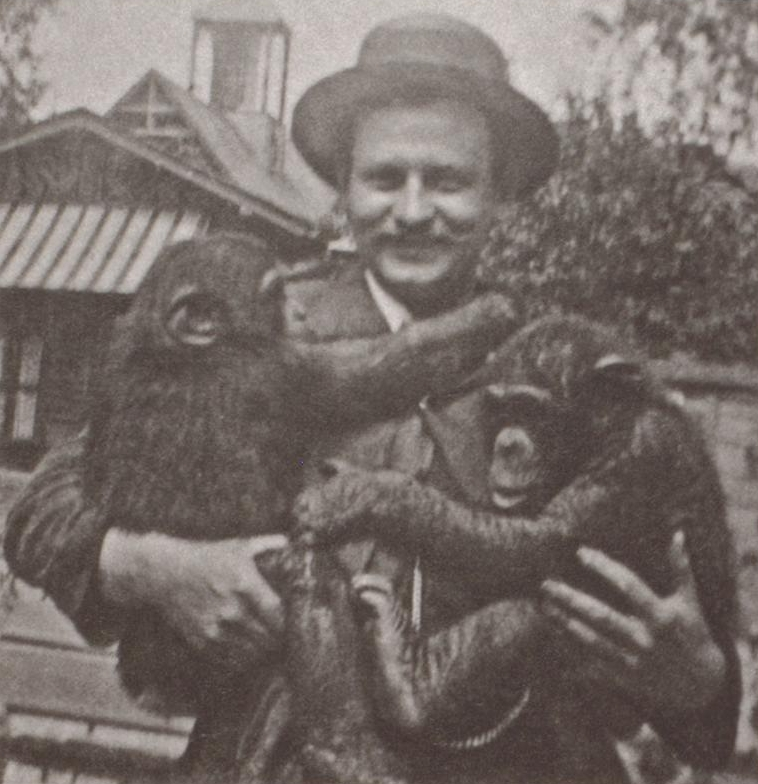 Adolf Nill, Besitzer von Nills Tiergarten in Stuttgart, mit seinen zwei Schimpansen Cora und Joko, 1894.